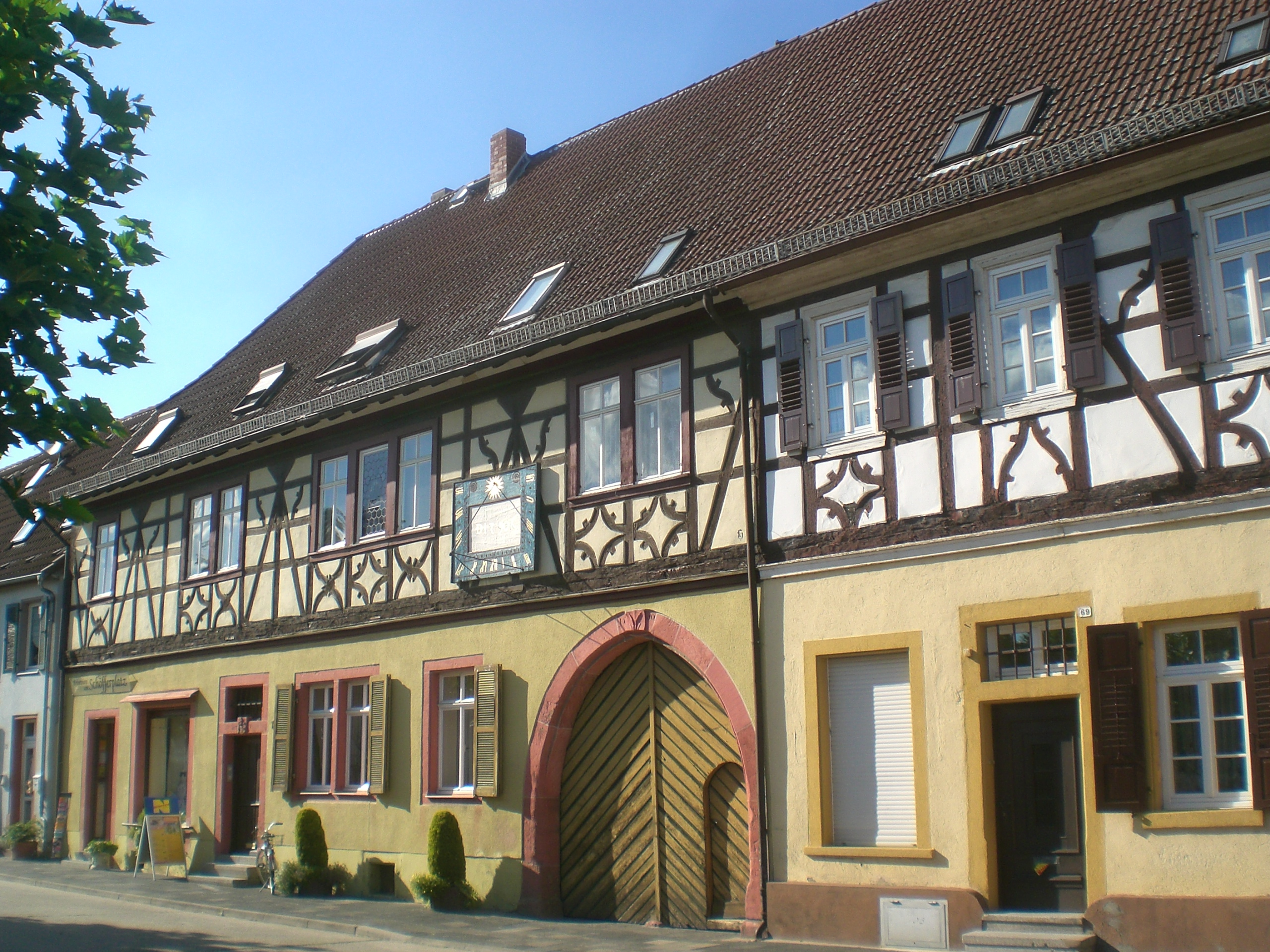 trabfakaj domoj Magdalenenstr. 71+69 en Gernsheim, Hesio